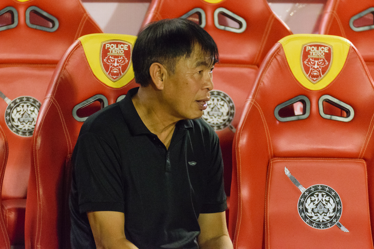 Witthaya Laohakul